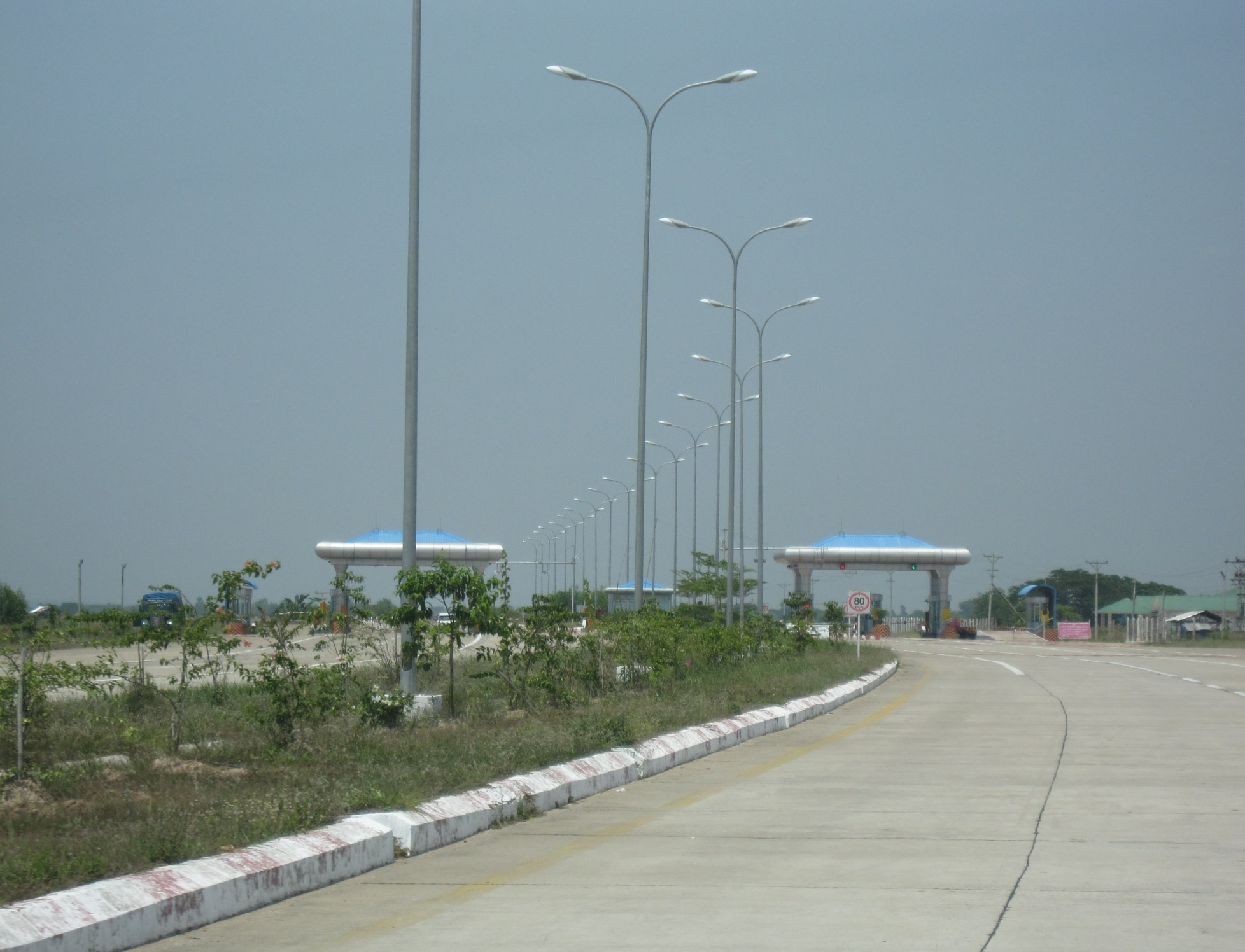 Mautstation Yangon / Yangon-Mandalay Expressway